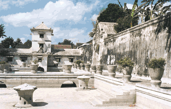 Taman sari